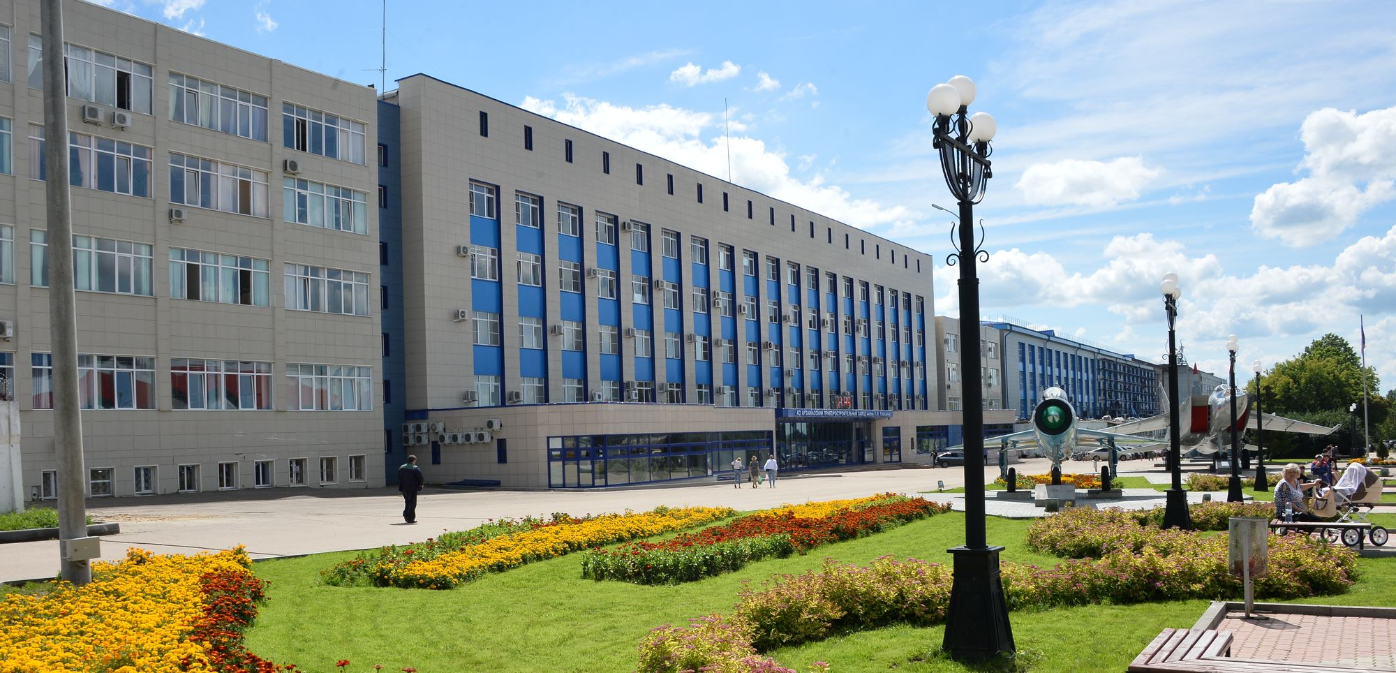 АПЗ